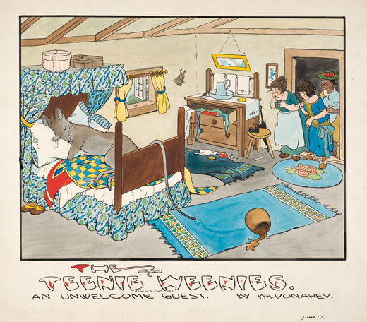 Donahey 1916 drawing of Teenie Weenies